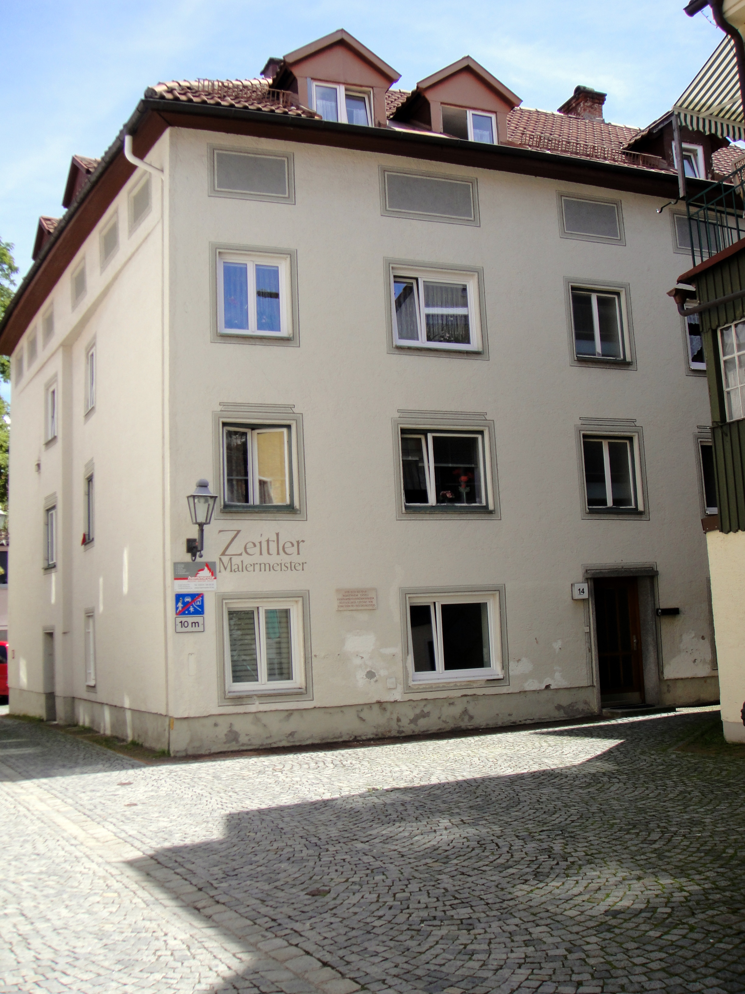 Kaufbeuren, Ledergasse 14, von 1858-1908 "Marienanstalt", das erste Fabrikarbeiterinnenwohnheim Deutschlands, geführt von den Schwestern des Crescentiaklosters